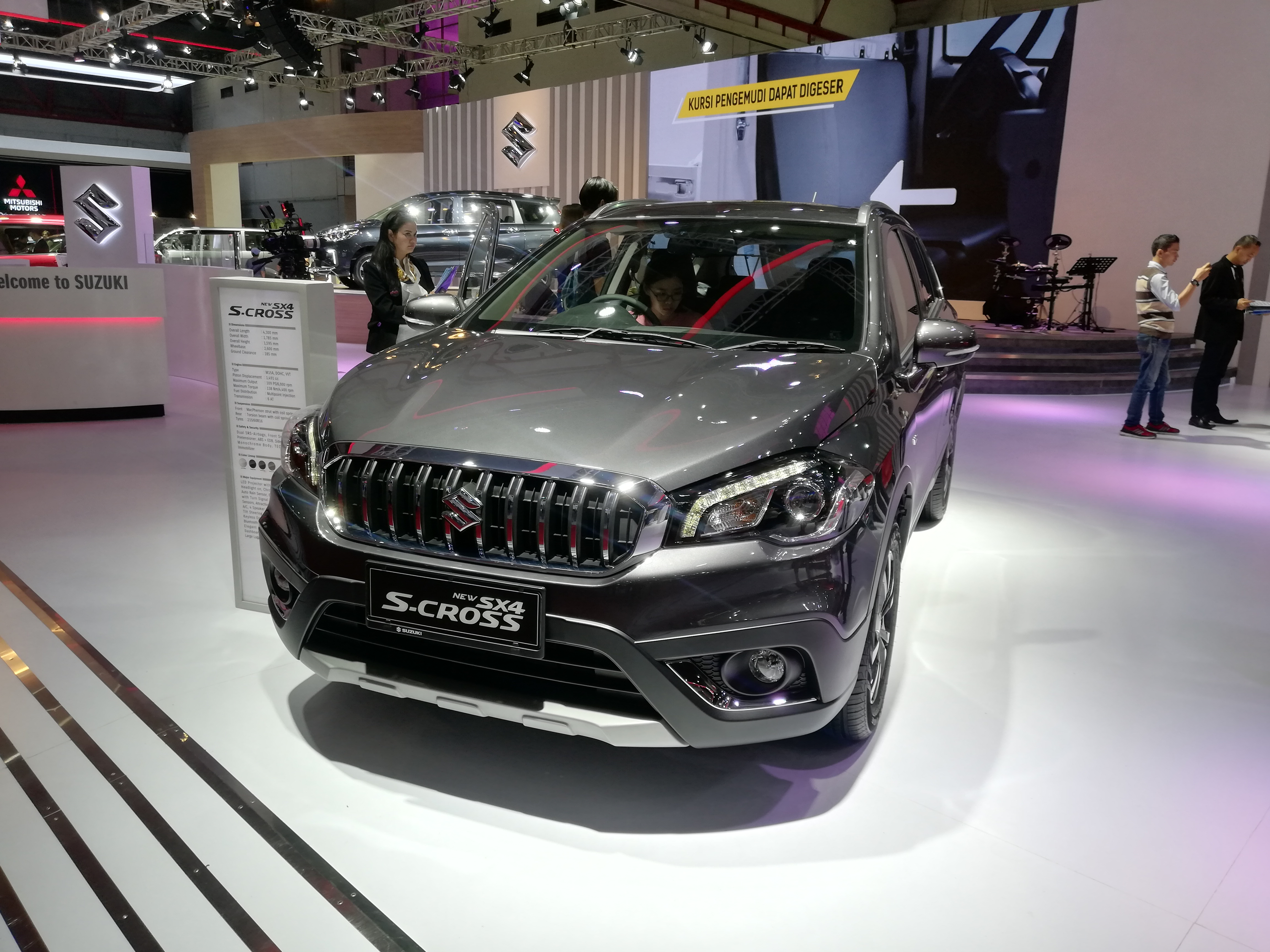 Suzuki S Cross di IIMS 2019